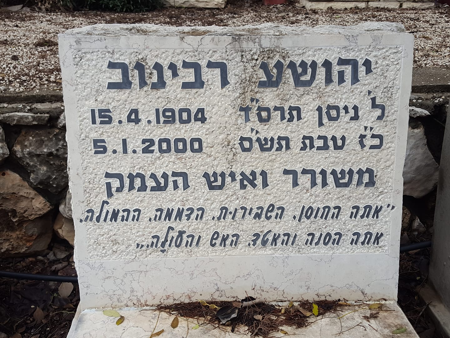 קברו של המשורר יהושע רבינוב משורר ואיש העמק בבית העלמין בגבת צילום אלי אלון